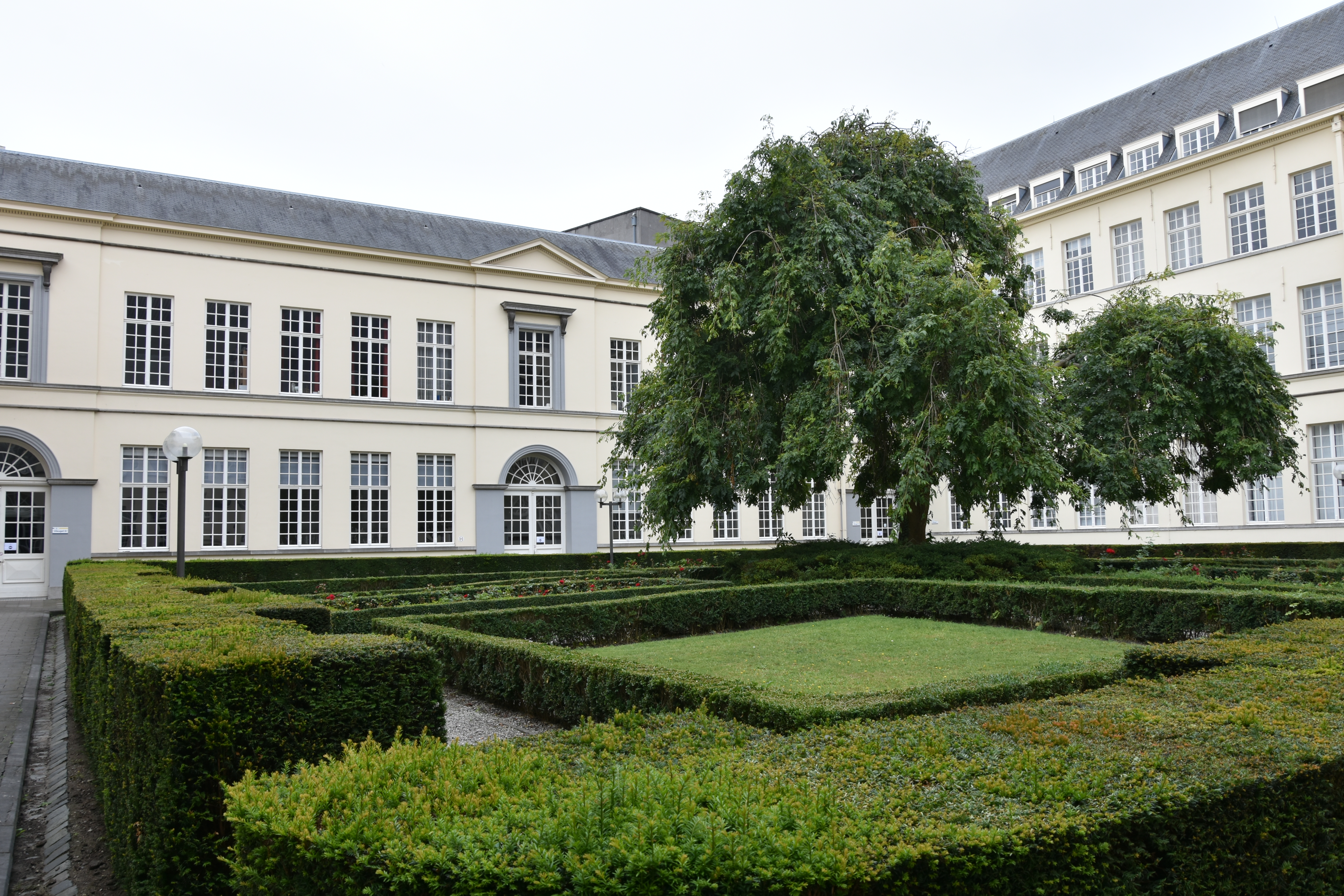 Gent - Emile Braunschool - de binnentuin van het classicistisch gedeelte (19e eeuw) ontworpen door architect Lodewijk Roelandt